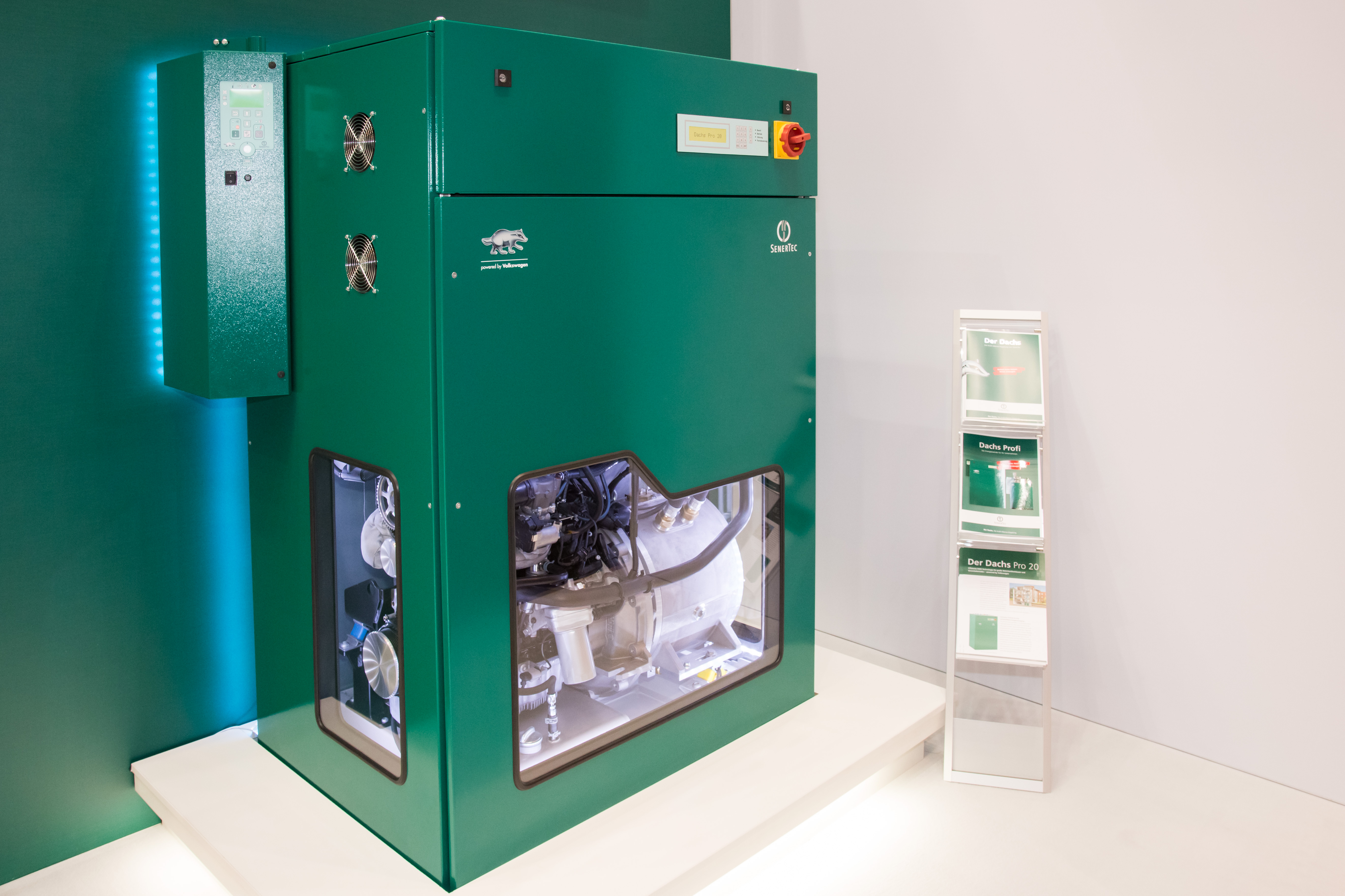 Das Volkswagen EcoBlue 2.0 Generation 1.2 in der Variante "SenerTec Dachs Pro 20 ST" auf der SHK Essen 2014. Ohne die MSR2 Steuerung (links am Gerät) ist das Volkswagen-Blockheizkraftwerk auch als "LichtBlick ZuhauseKraftwerk" in der Farbe silber erhältlich. Daten: 19,2 kW elektrisch; 36,1 kW thermisch